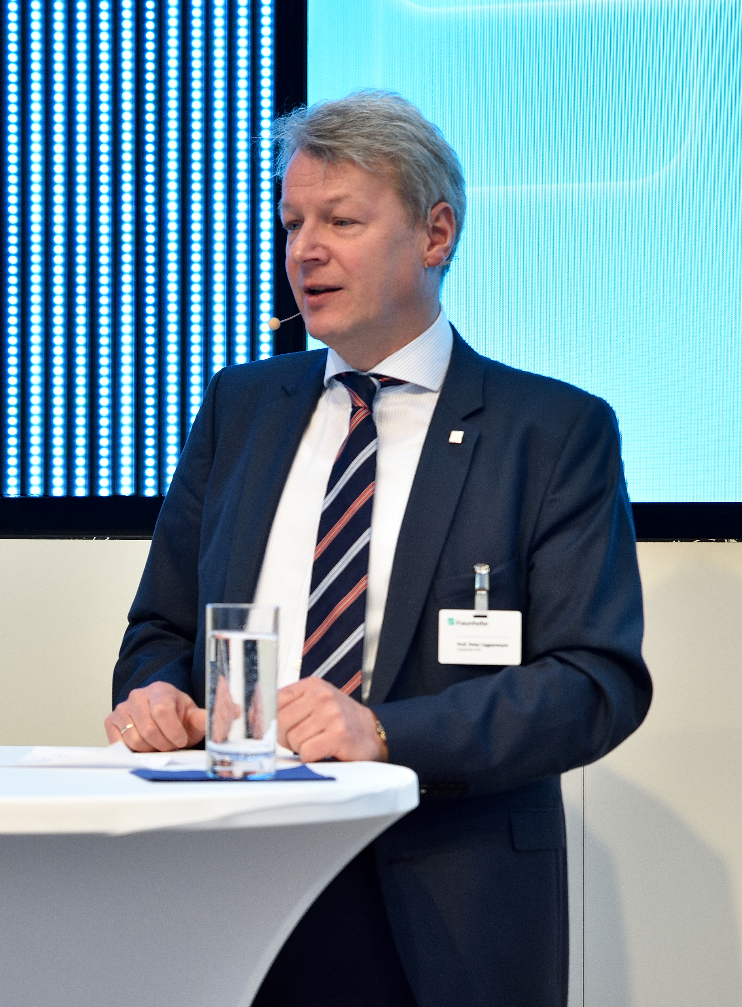 Peter Liggesmeyer auf der CeBIT 2016 in Hannover